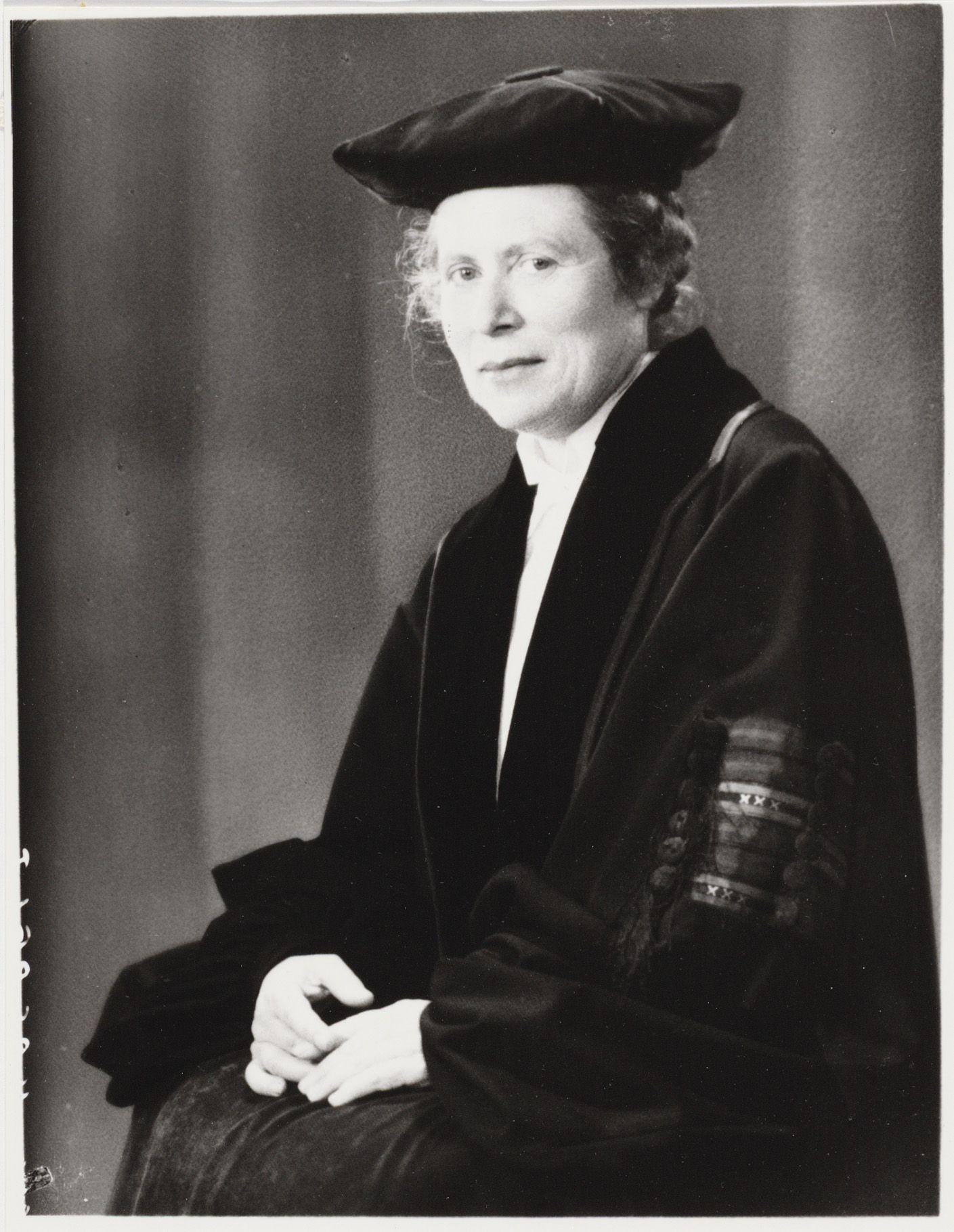 Beschrijving Prof. C.H. Emilie Haspels Documenttype foto Vervaardiger Merkelbach, Atelier J. Collectie Collectie Atelier J. Merkelbach Datering 1948 Inventarissen Afbeeldingsbestand B00000002151 Generated with Dememorixer